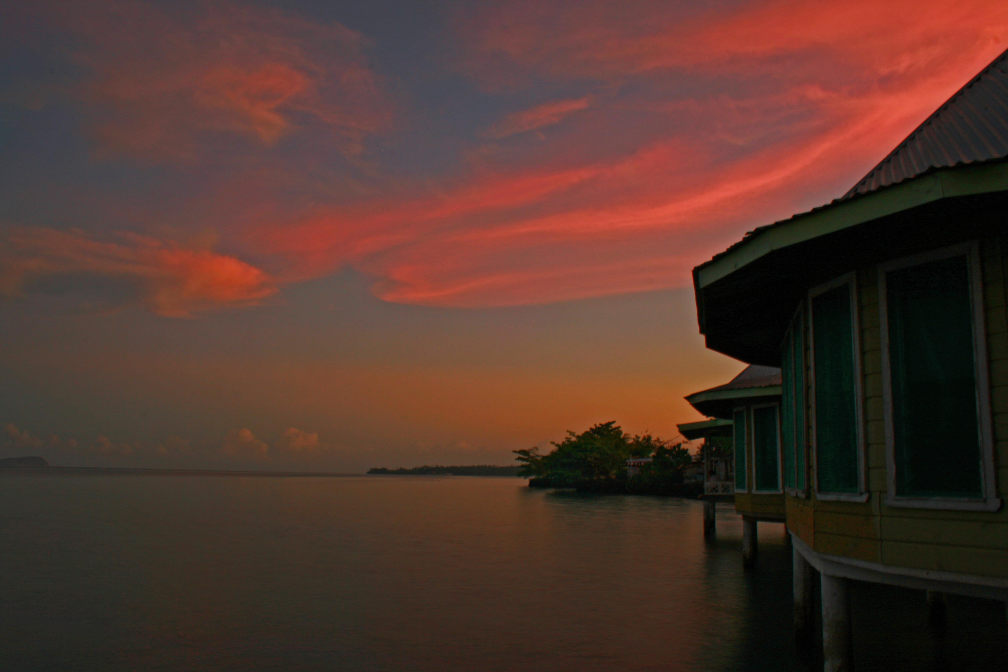 Sunset at Sapapali'i on Savai'i island in Samoa.